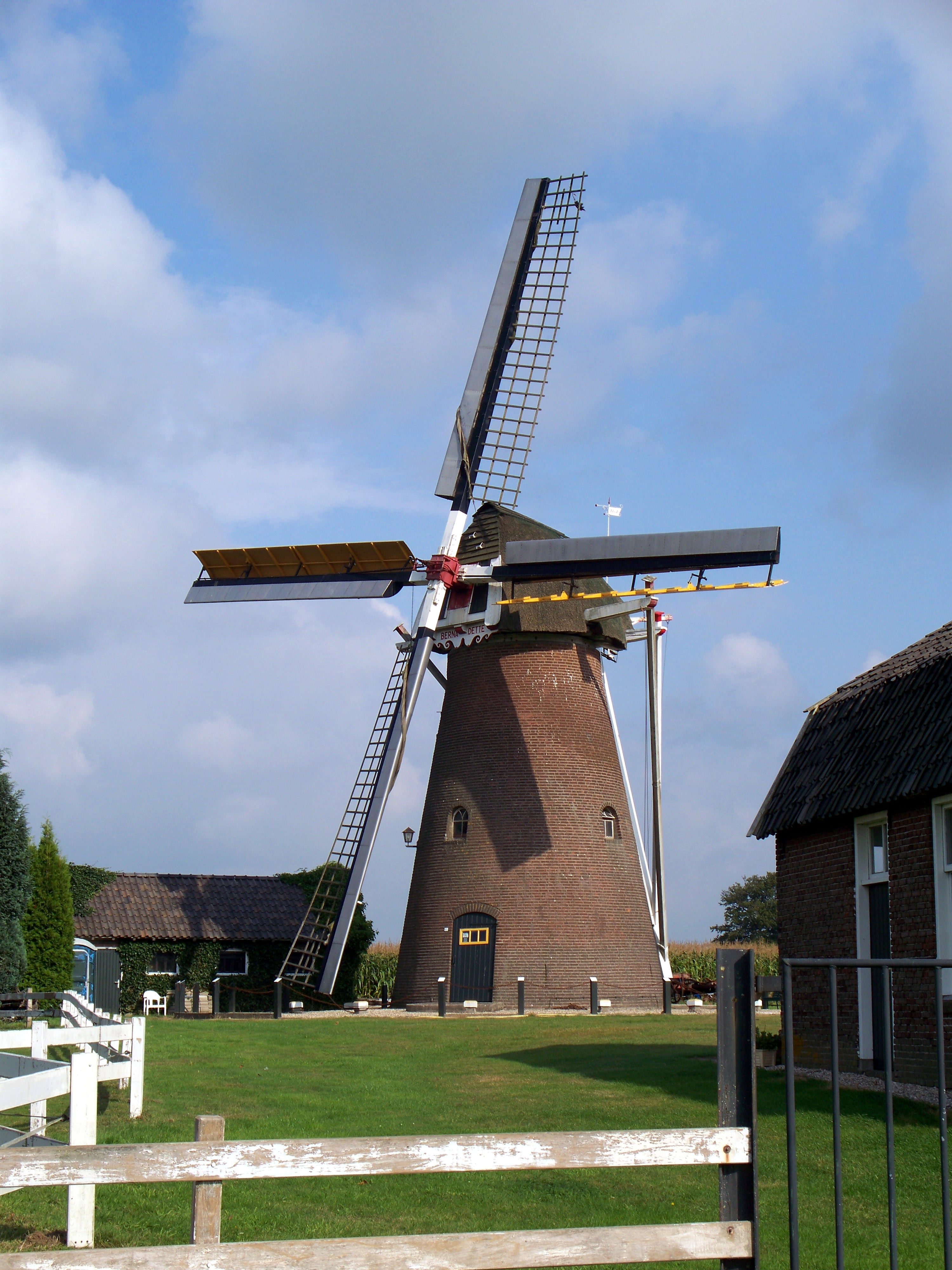 Molen Bernadette te Nieuw-Wehl, Kerkhofweg